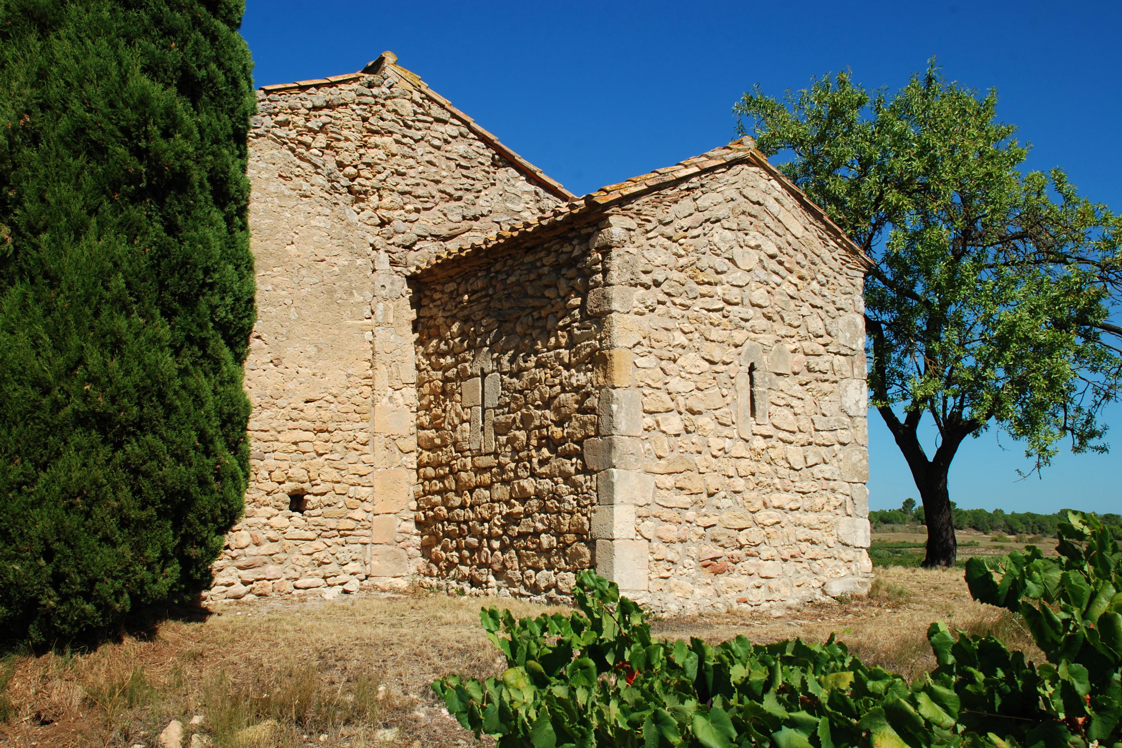 France - Languedoc - Aude - Moussan - chapelle Saint-Laurent (préroman) - chevet carré .